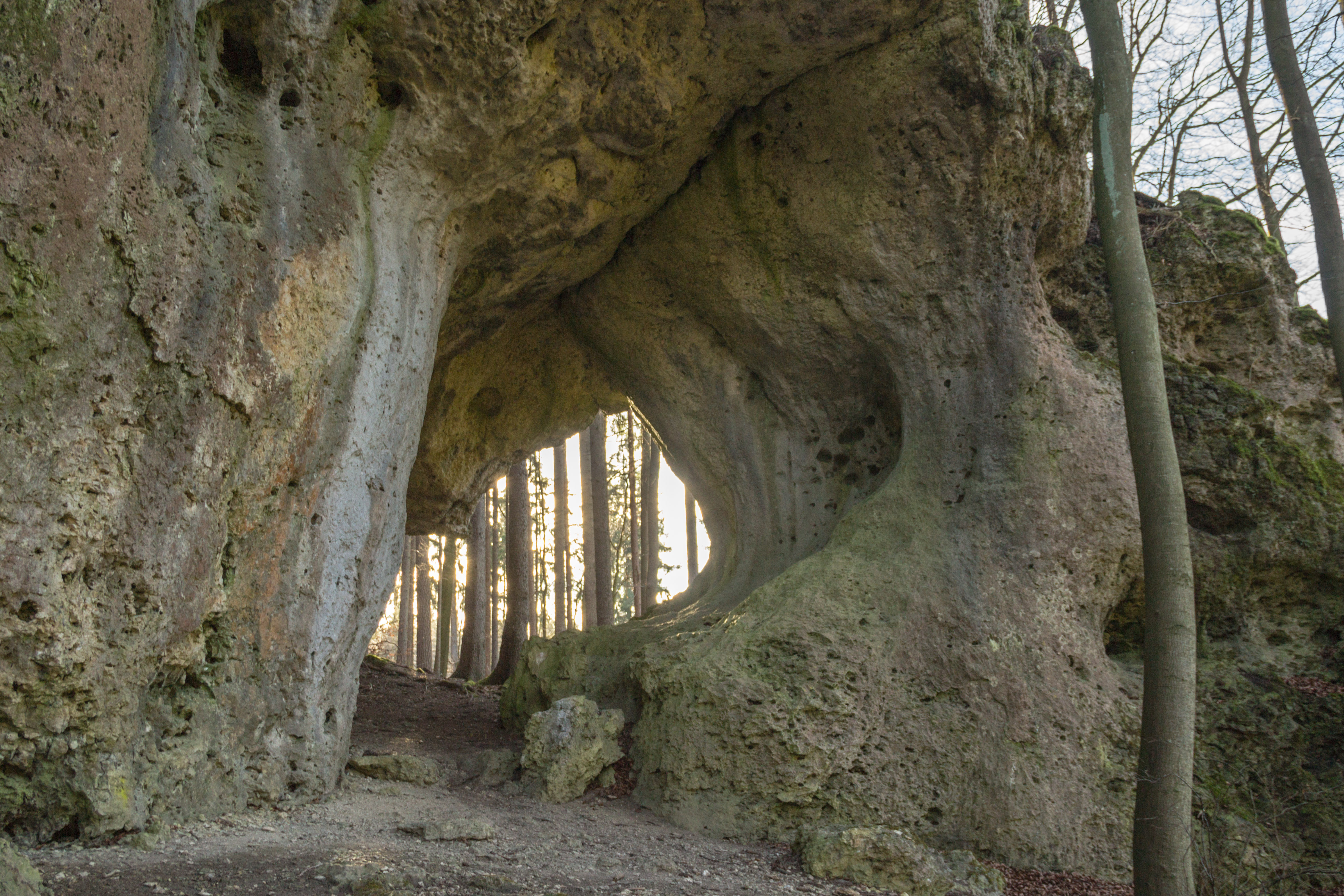 Wassersteintor, D 33, Naturdenkmal, Geotop, Kröttenhof, Betzenstein